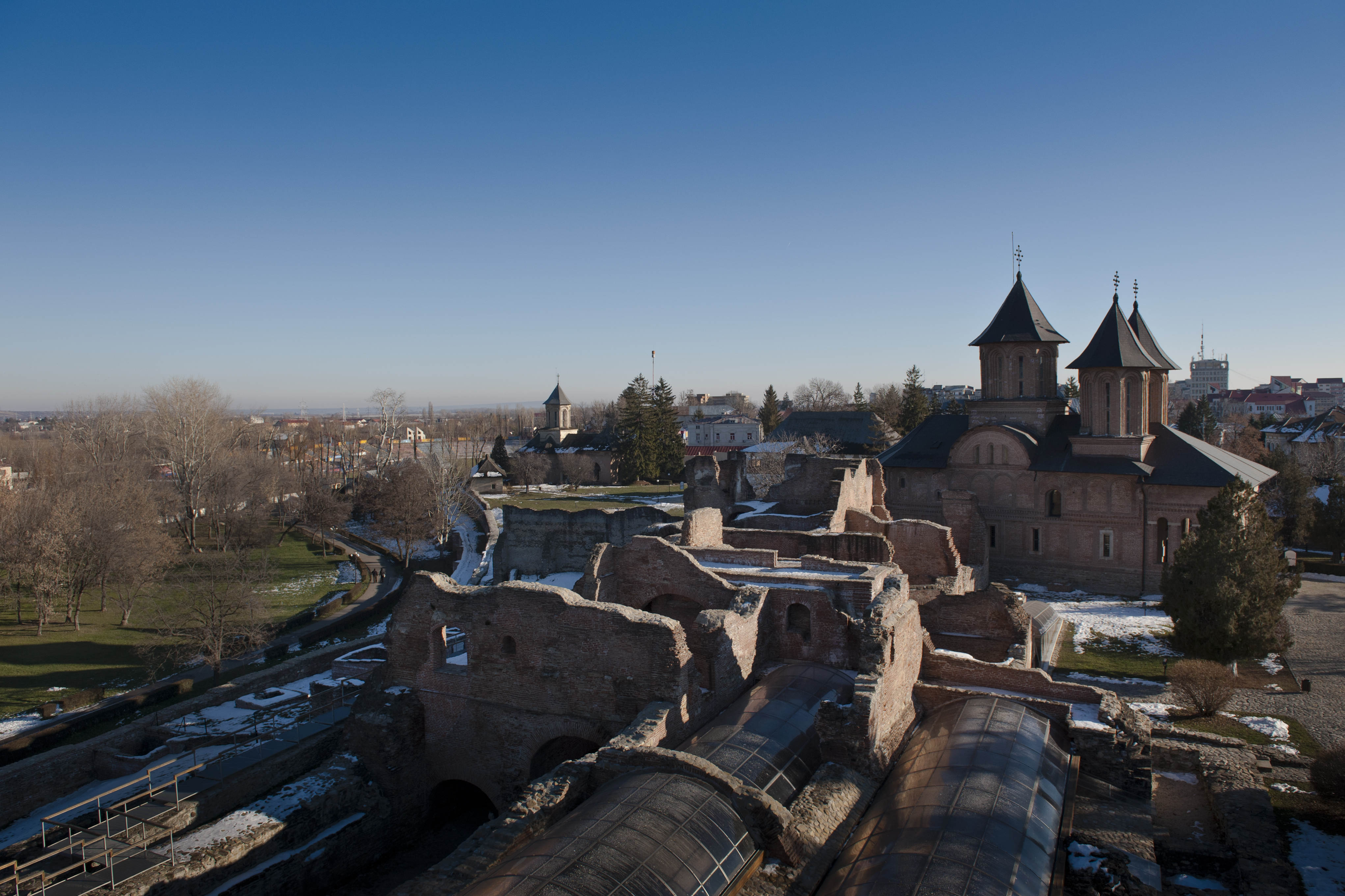 Curtea Domnească